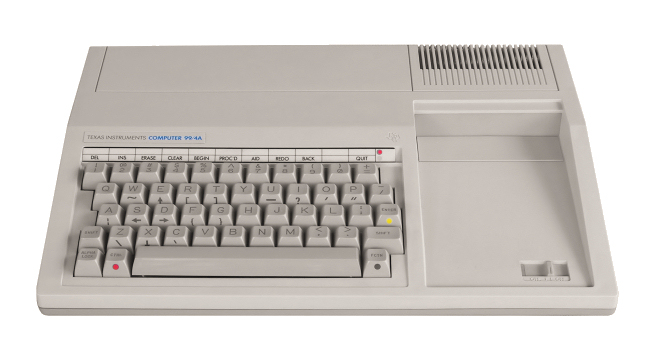 Foto eines Texas Instruments TI-99/4A (beige Version, Vorderansicht)